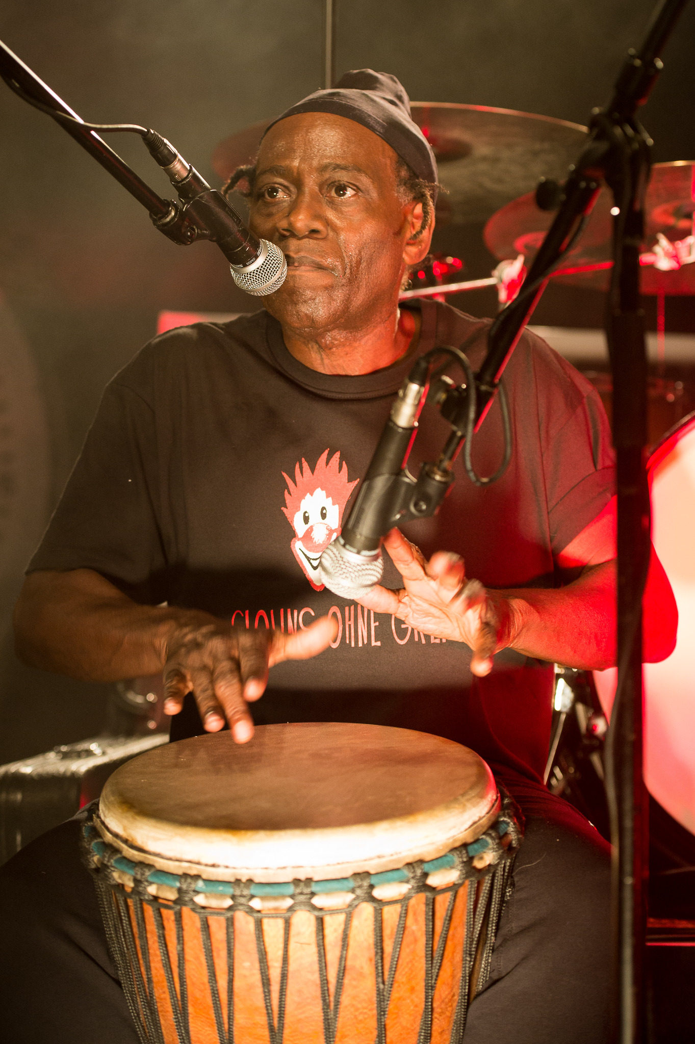 Concertbüro Franken,Der Hirsch,Konzert,Livekonzert,Livemusik,Musik,Wally Warning